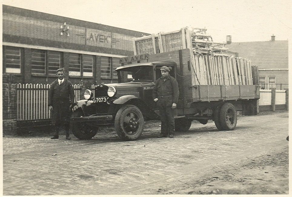 Foto van een oude open Avek truck, geladen met metalen bedden